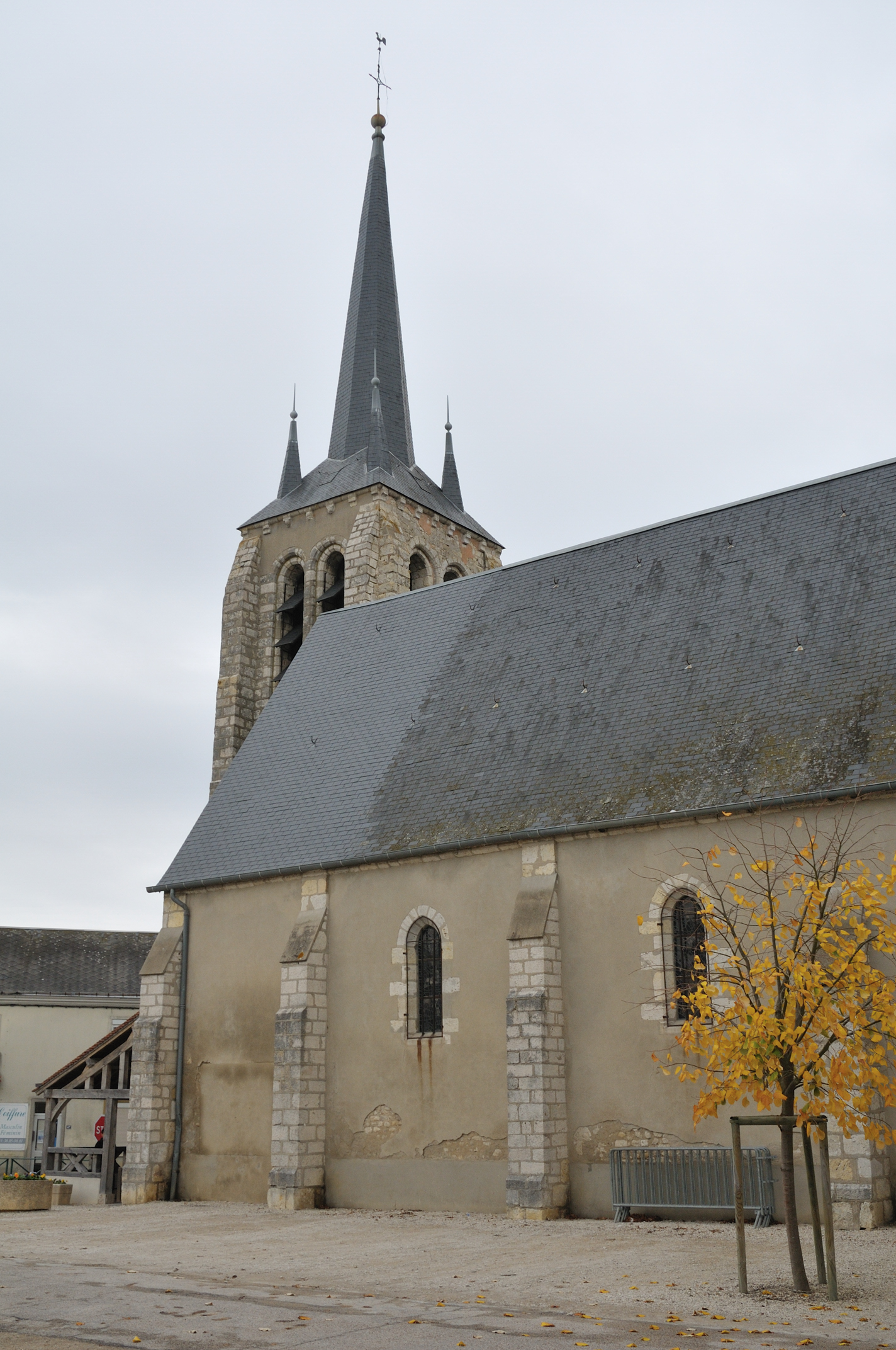 Église de Vimory, Loiret, France